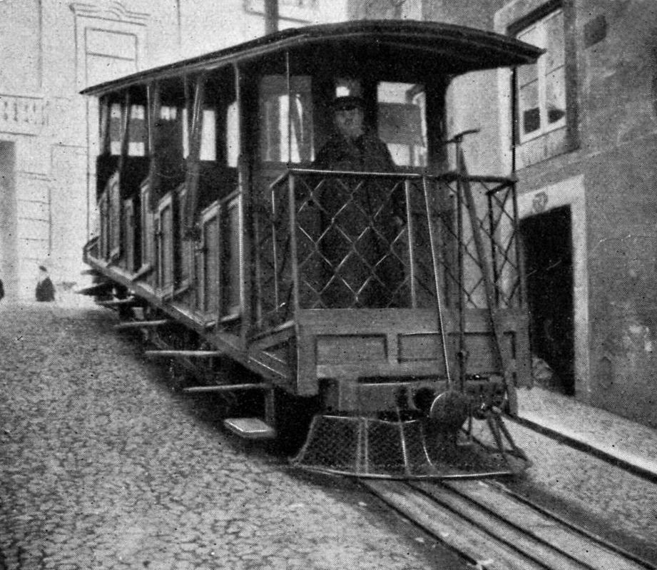 Uma das duas carruagens do Elevador da Bica na paragem superior, 1909; note-se o trilho, com as duas fendas para o cabo mas apenas dois carris: Nesta época ainda não era em via algaliada.